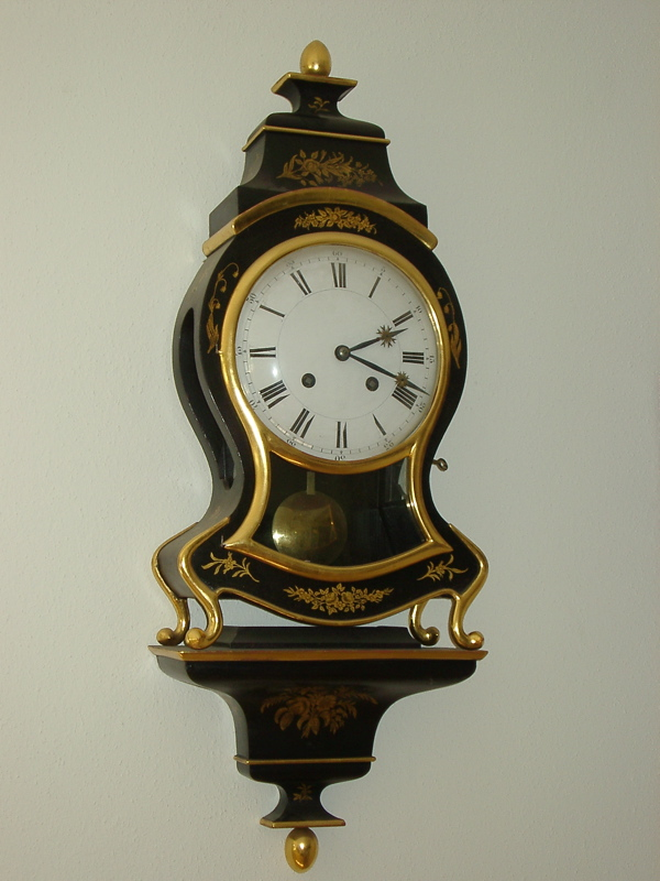 Sumiswaelder Pendeluhr